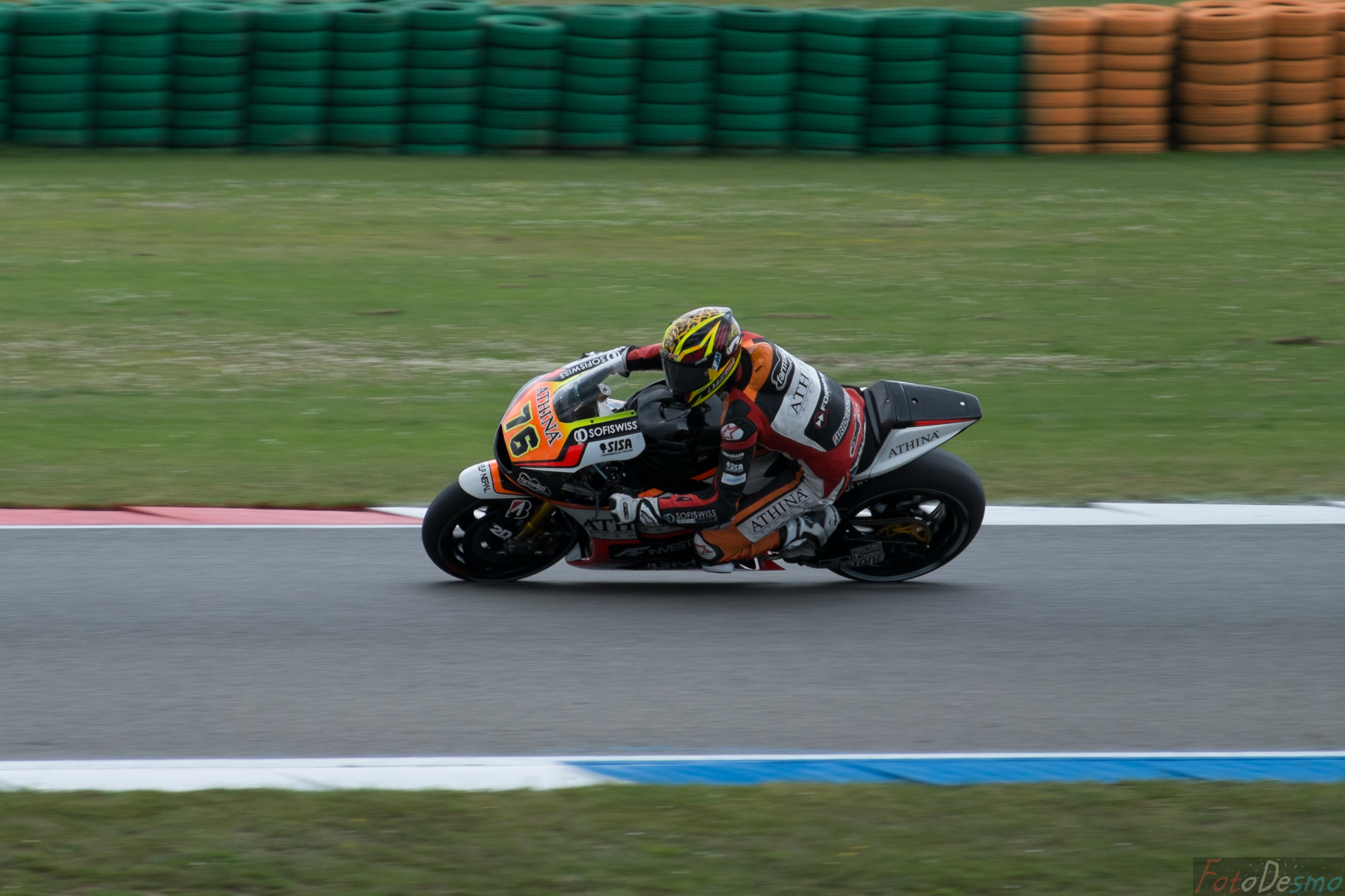 Loris Baz-TT Assen 2015